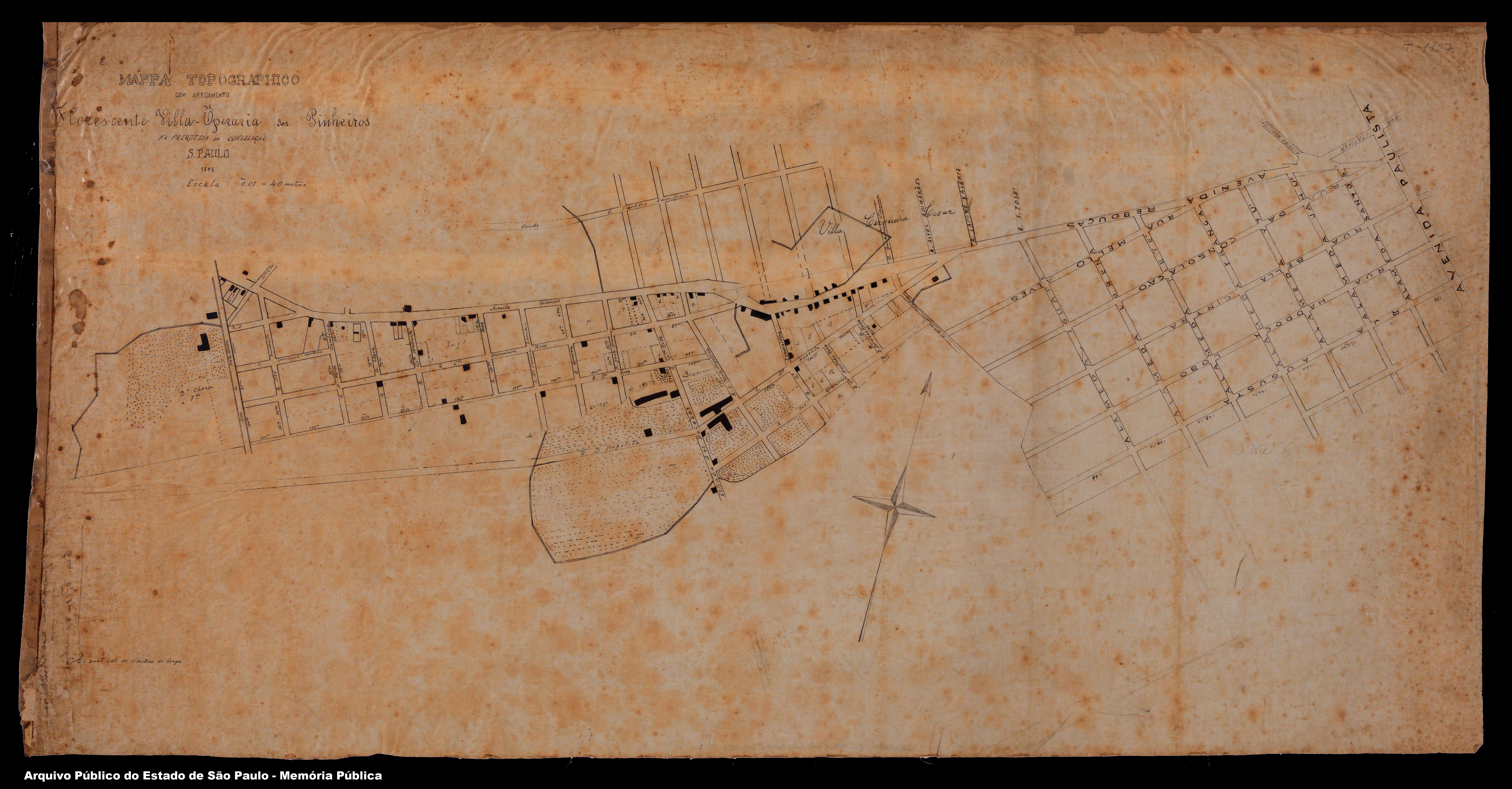 Mappa Topographico com o arruamento da Florescente Villa Operária dos Pinheiros na Freguezia da Consolação São Paulo (1897)